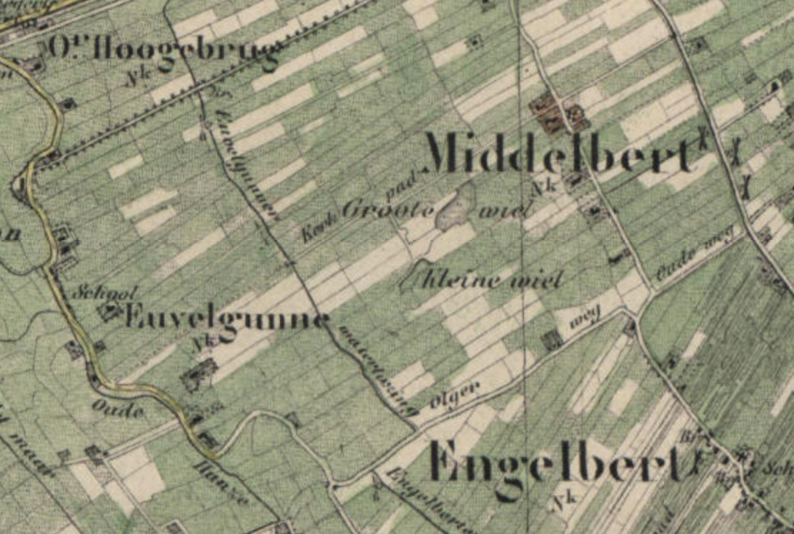 Middelbert en Engelbert met het Groote Wiel en het Kleine Wiel op een kaart van omstreeks 1864